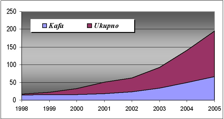 Serbian:Ucešce_kafe_u_ukupnom_obimu_prodaje_fairtrade_proizvoda_u_Ujedinjenom_Kraljevstvu.jpg